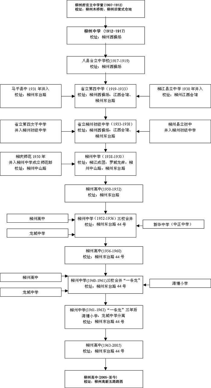 中文（中国大陆）: 柳州高中的校址变迁图